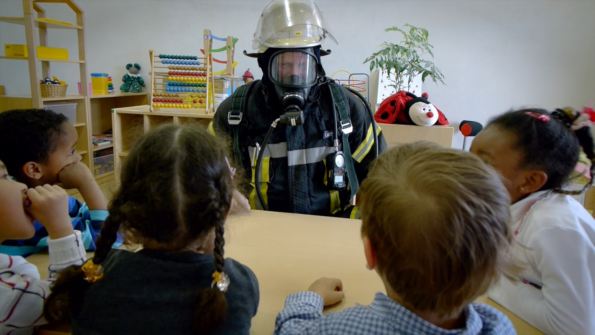 Henning der Feuerwehrmann erklärt im Kindergarten, wie man sich im Brandfall verhalten soll. Aus aus "Nochmaaal - Bei der Feuerwehr".